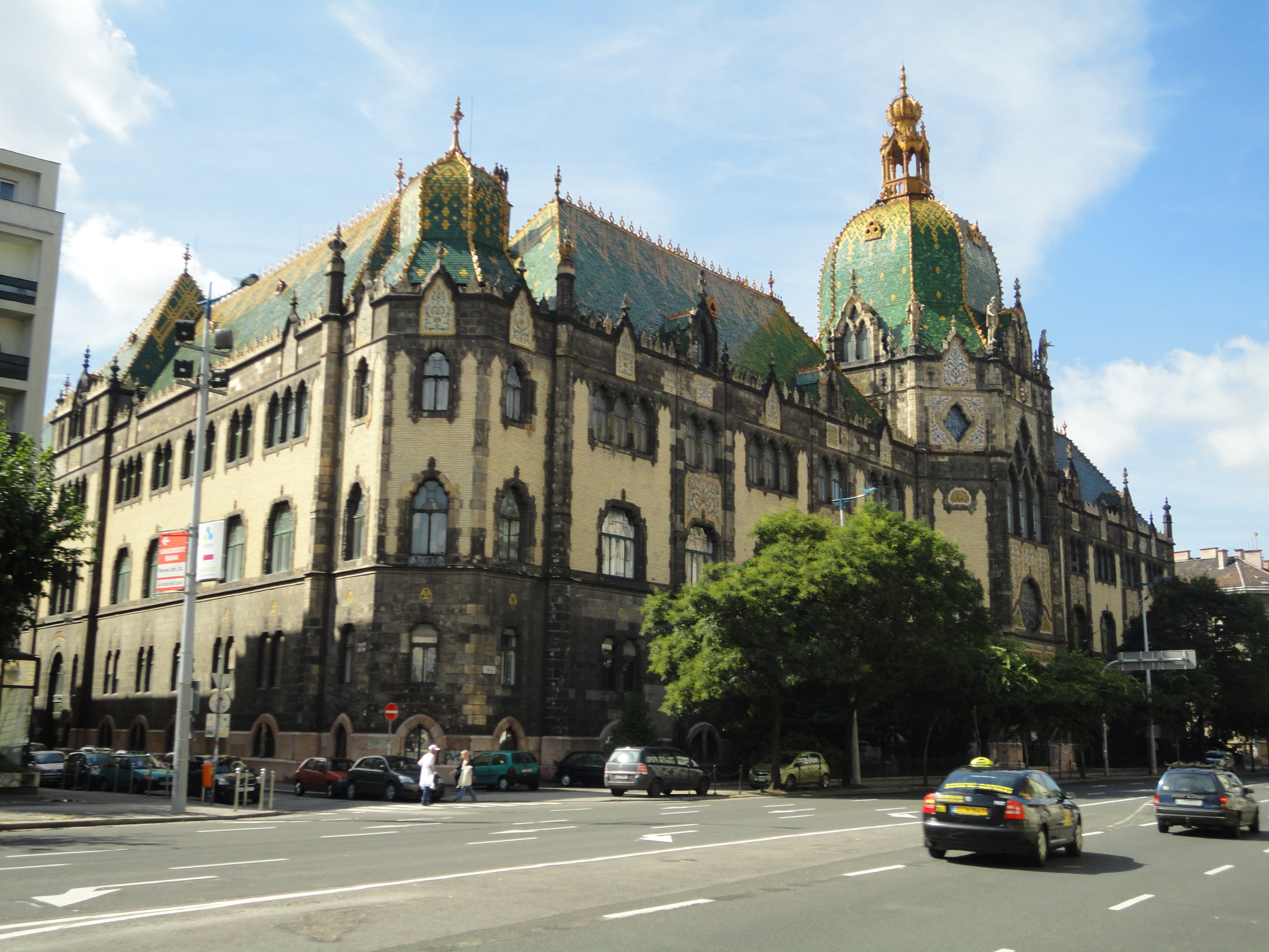 Iparművészeti Múzeum This is a photo of a monument in Hungary. Identifier: 1070